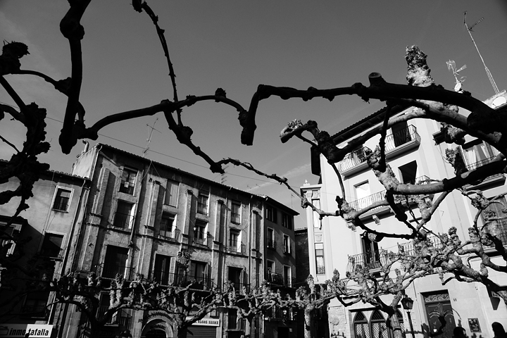 Tafalla - placeta de las pulgas